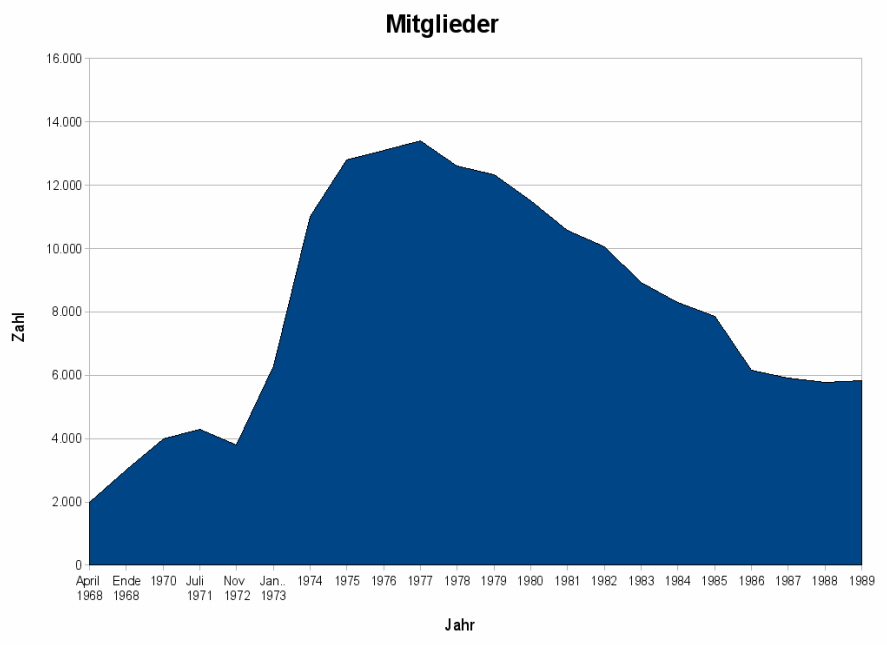 Mitglieder PPR